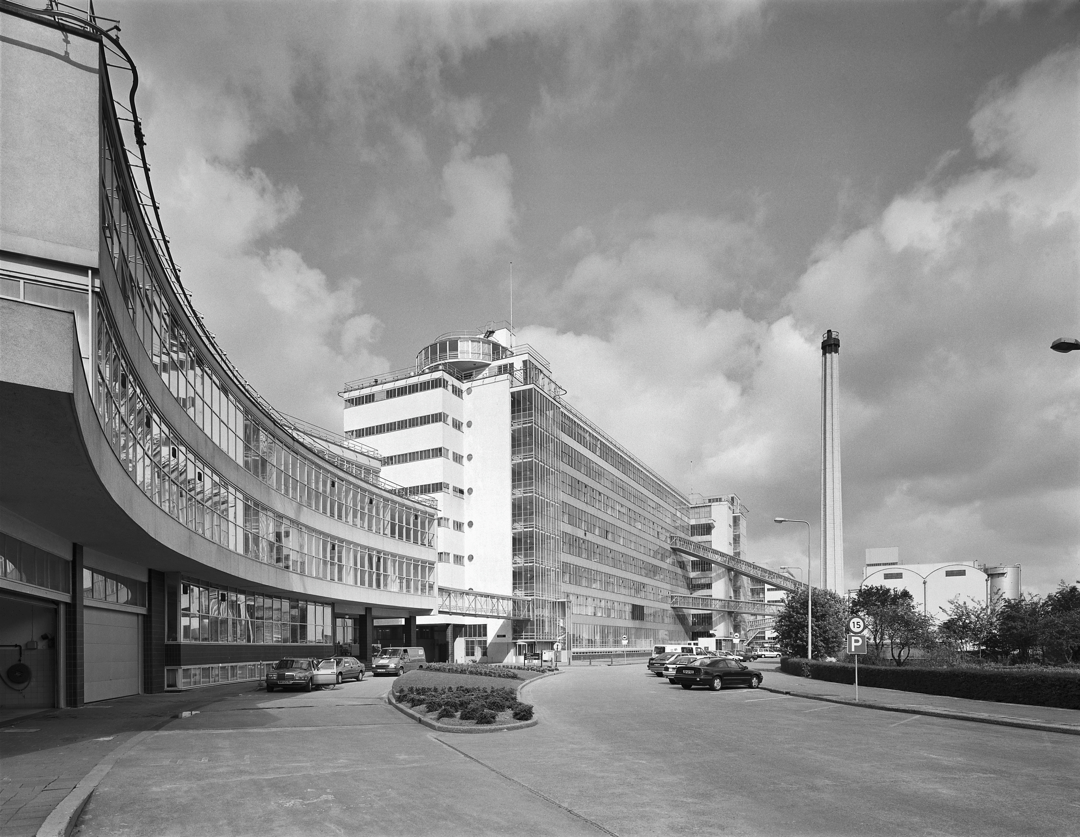 VAN NELLE FABRIEK: Exterieur OVERZICHT